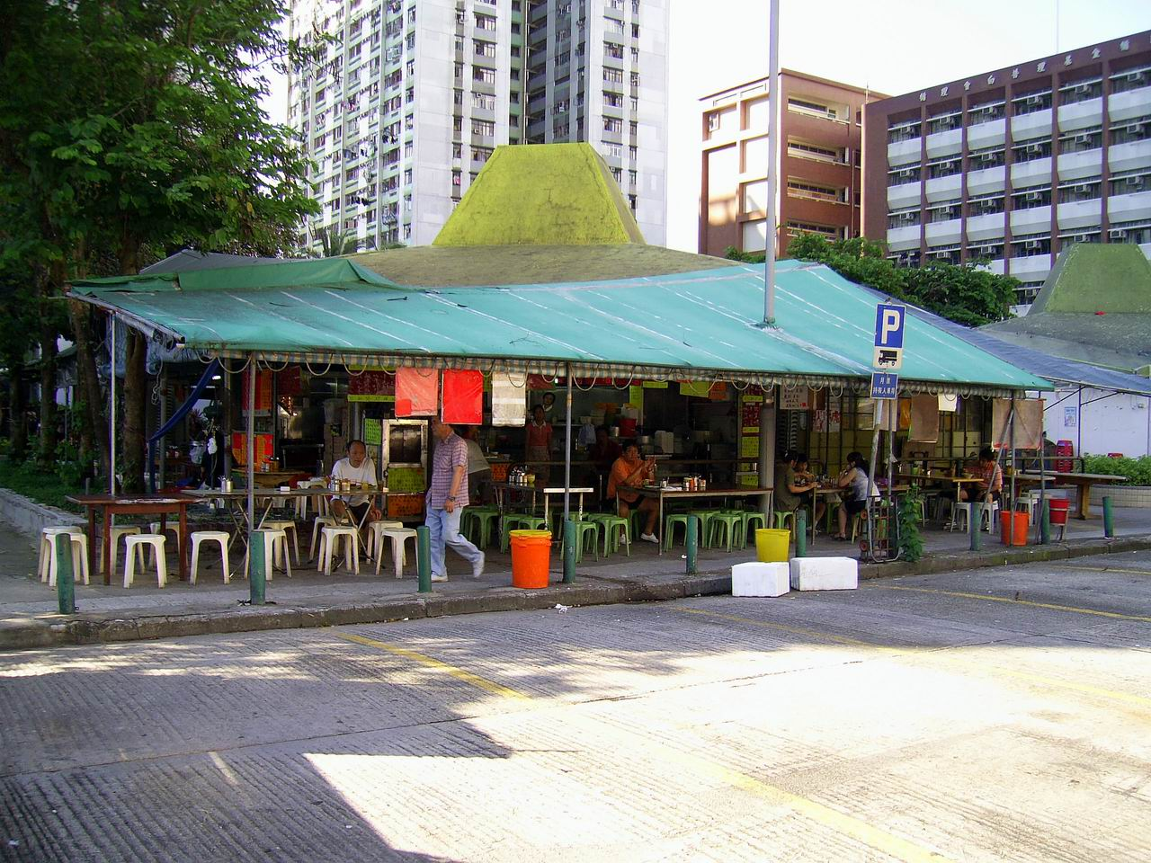 中文（香港）: 傳統的冬菇亭